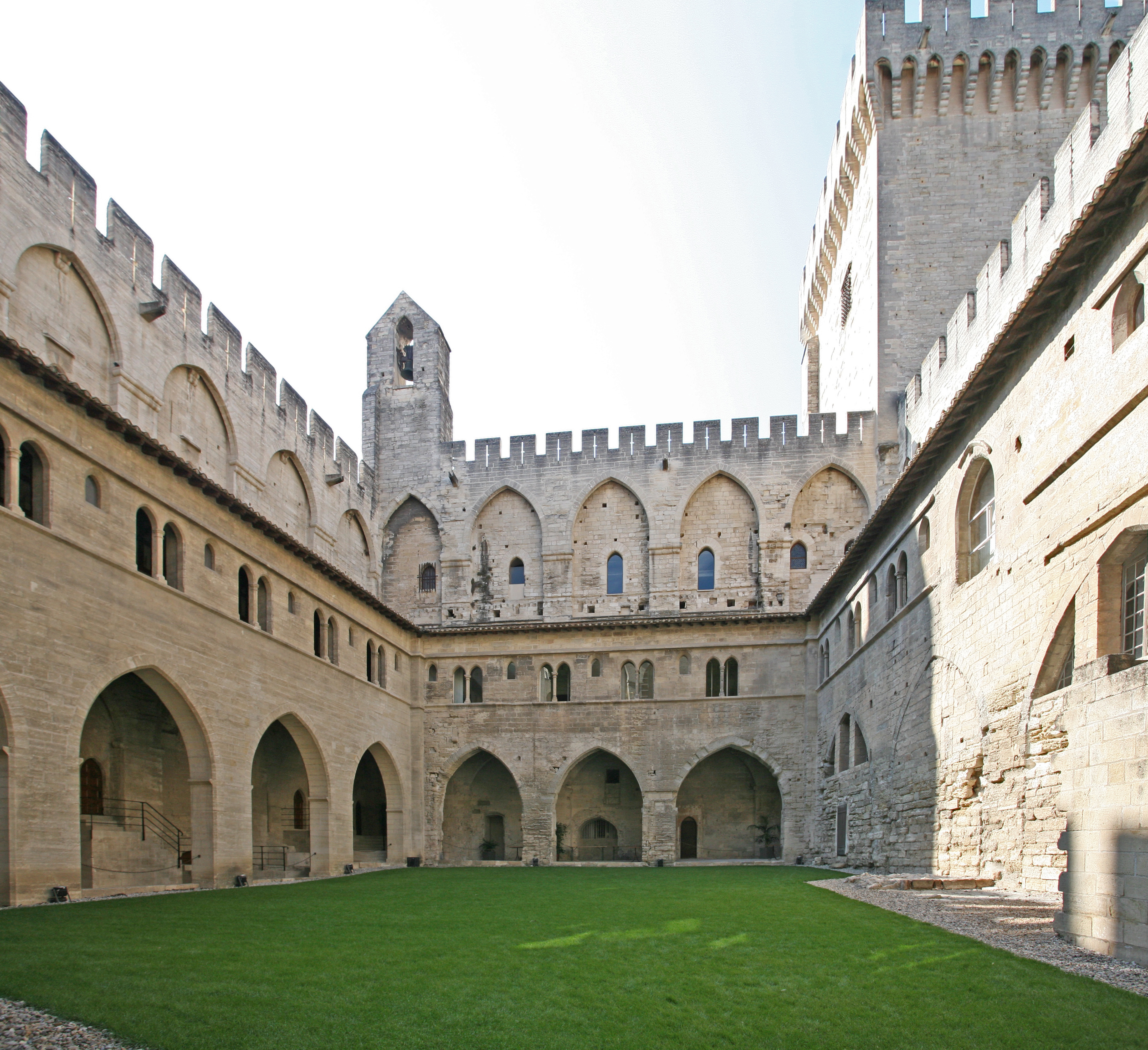 Cour du Cloitre, Palais des Papes, Avignon, Vaucluse, France